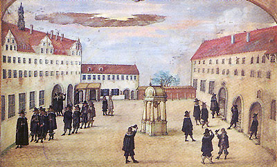 Die Universität Wittenberg 1644